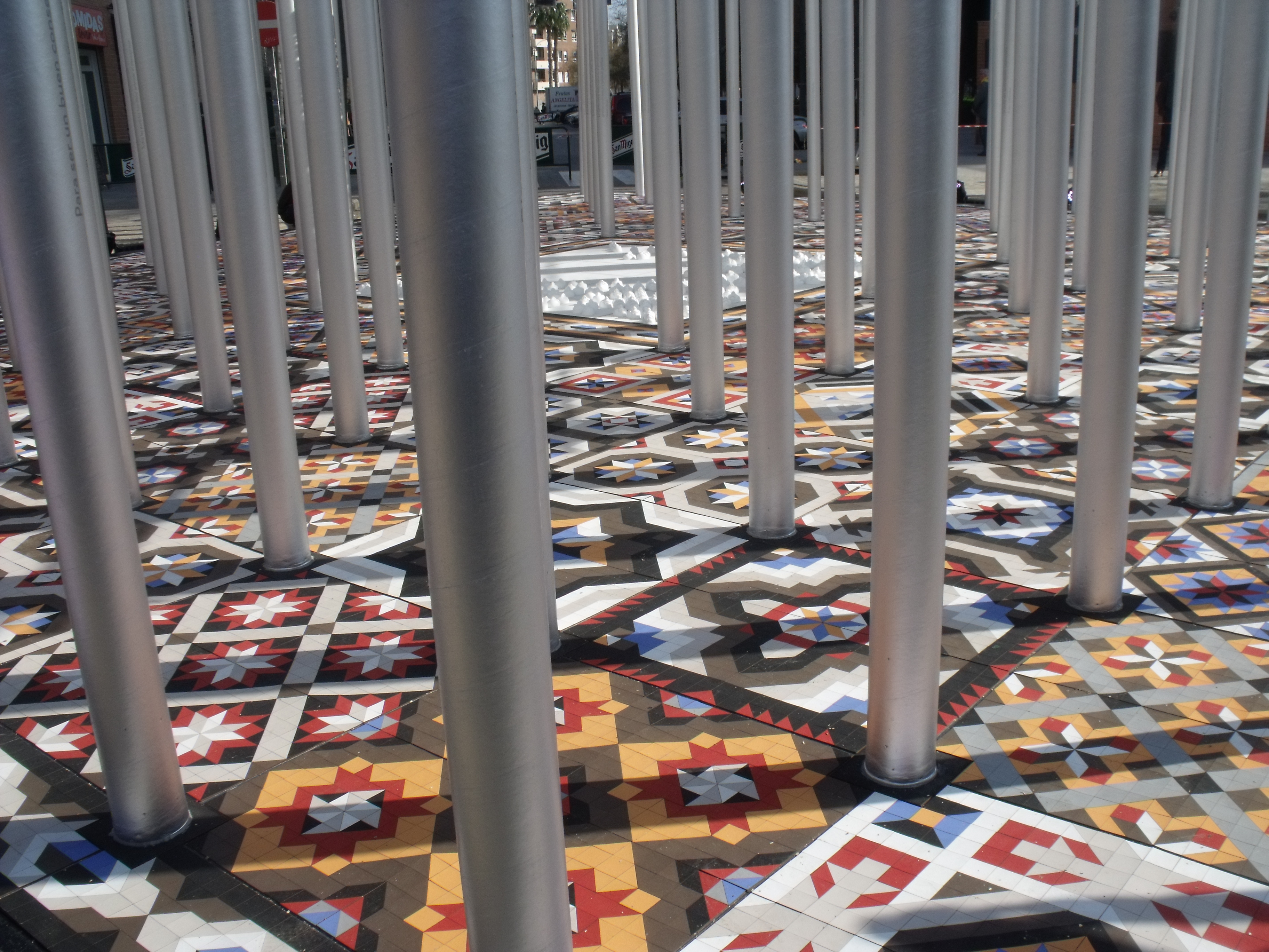 detalle plataforma falla